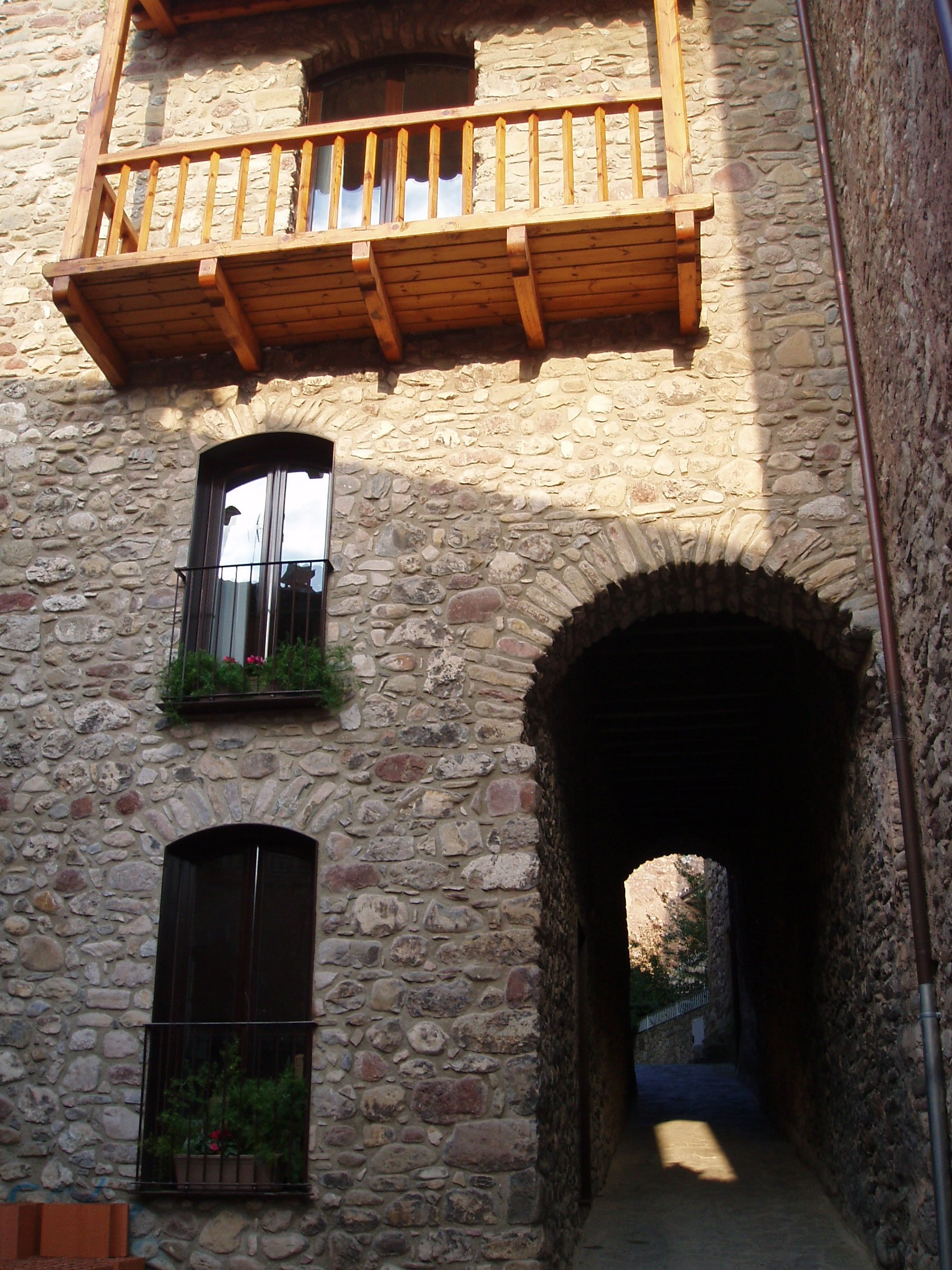 Porta d’accés al pati d’armes. Una rampa salva el desnivell existent entre el peu dels murs i el pati d’armes.